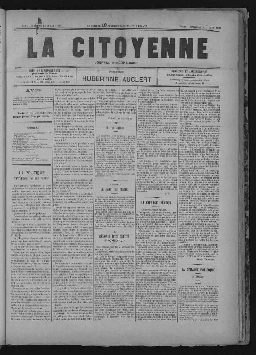 La Citoyenne, n° 21, 3 juillet 1881 Auclert, Hubertine (1848-1914) [214] Dimension 53 x 40 cm Localisation : Bibliothèque Marguerite Durand Date de mise en ligne : 21/07/2017 Droits d'accès Consultable sans restrictions Droits domaine public